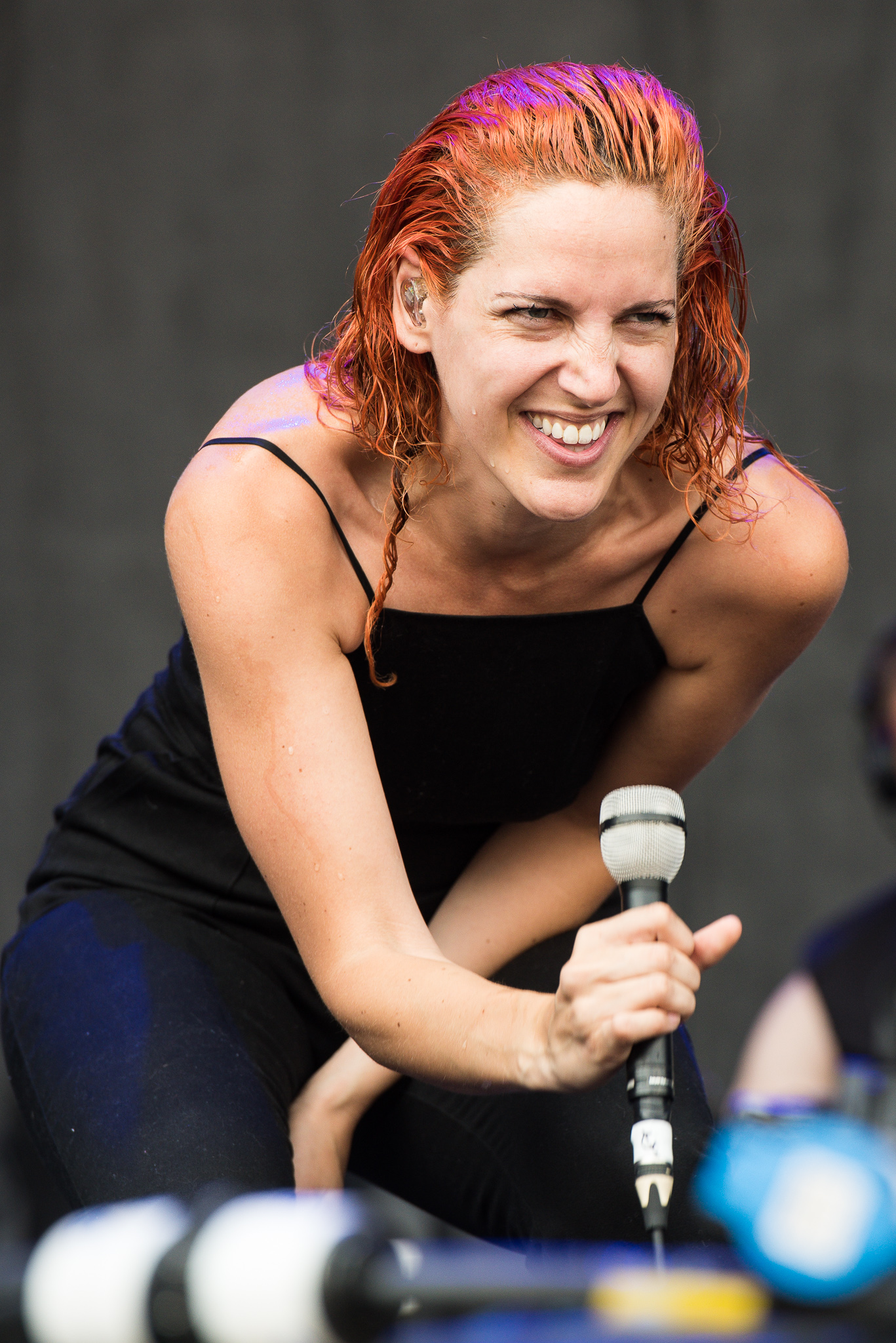 ARGO-Konzerte,Beck's Park Stage,Festival,Konzert,Livekonzert,Livemusik,Lizzy Plapinger,Ms Mr,Musik,RiP,Rock im Park 2015